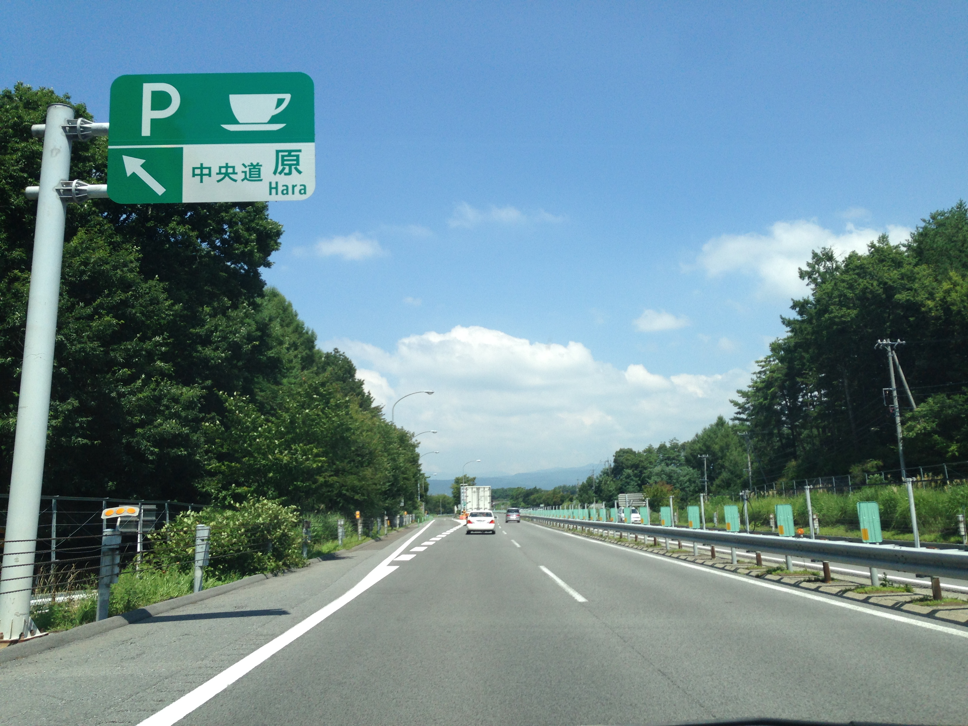 中央自動車道下り、中央道原パーキングエリアの案内標識